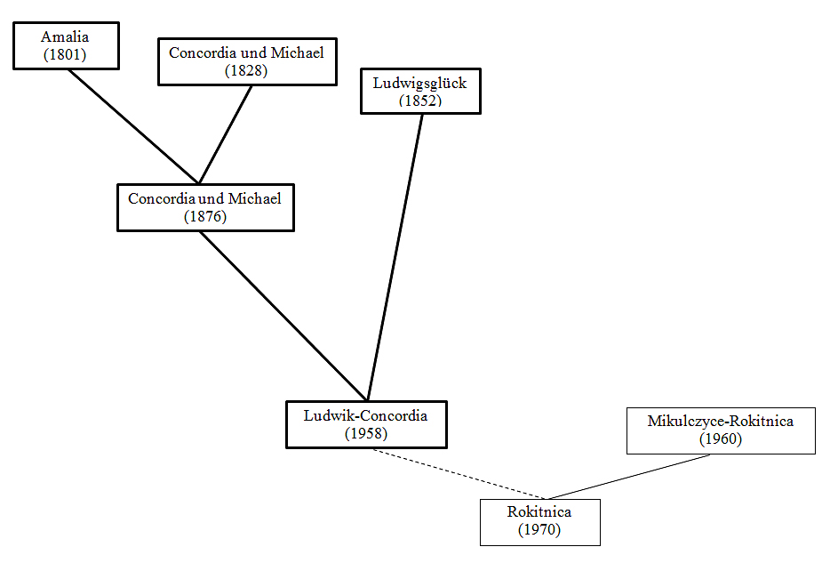 Fusionen des Bergwerks Ludwik-Concordia